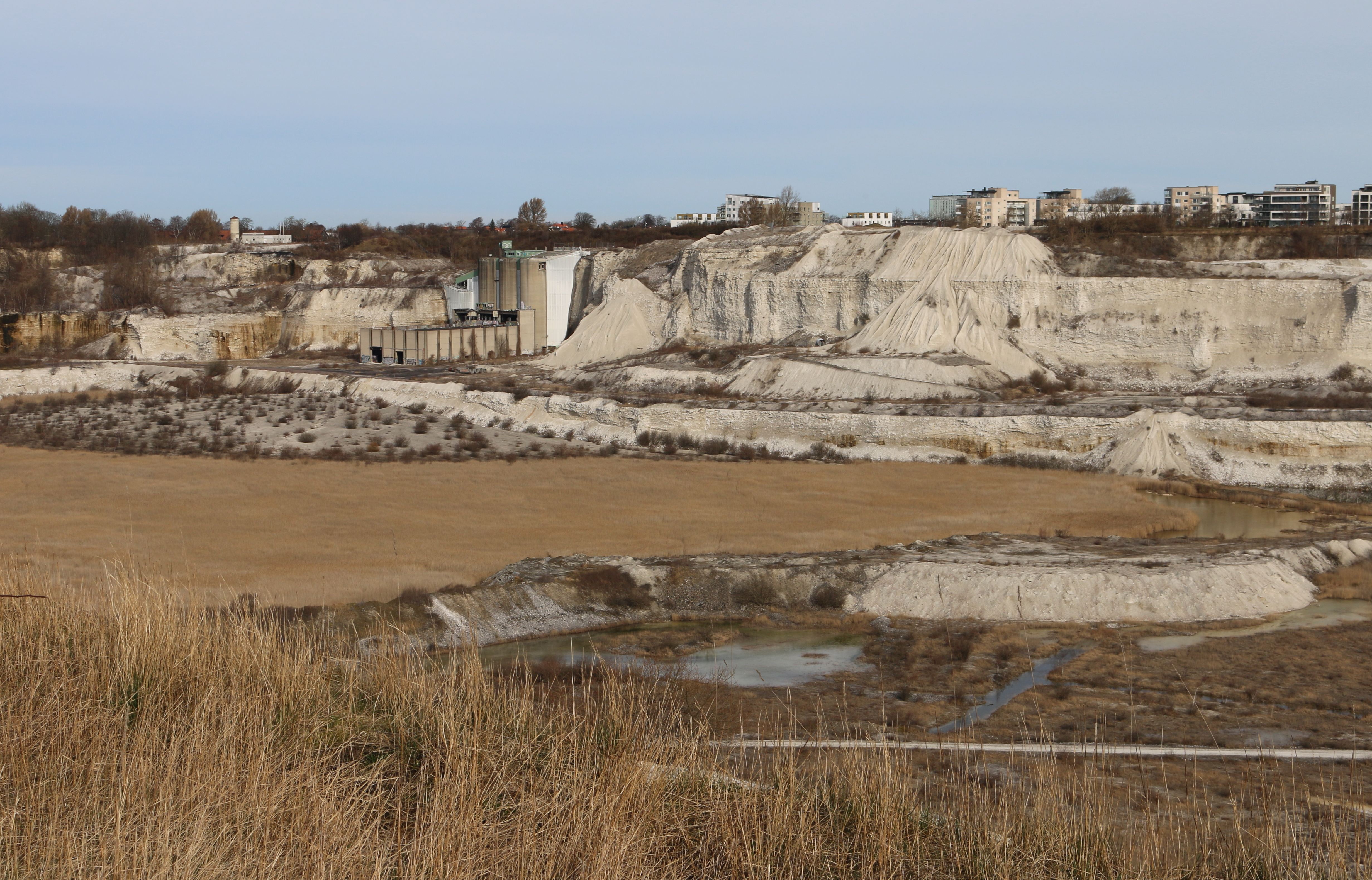 Limhamns kalkbrott i mars 2015